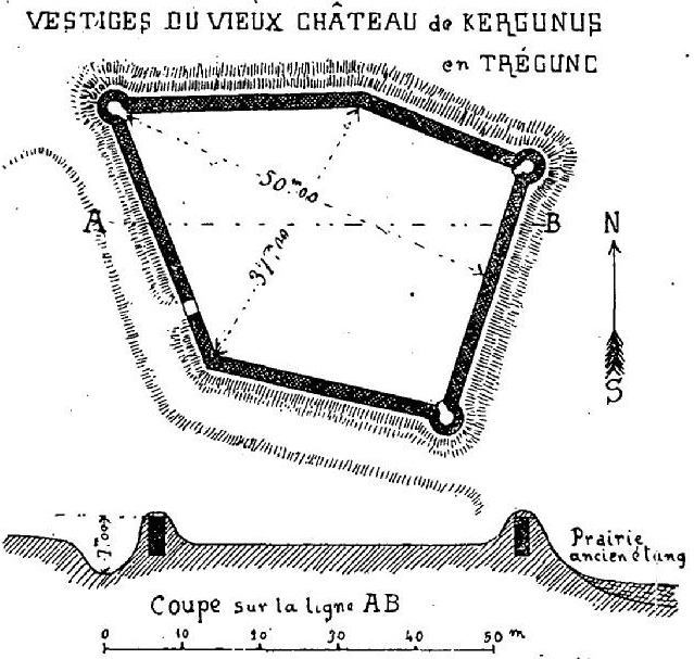 Plan du château disparu de Kergunus en Trégunc (Finistère) dessiné le 10 juillet 1906 par l'historien Jean-Marie Abgrall